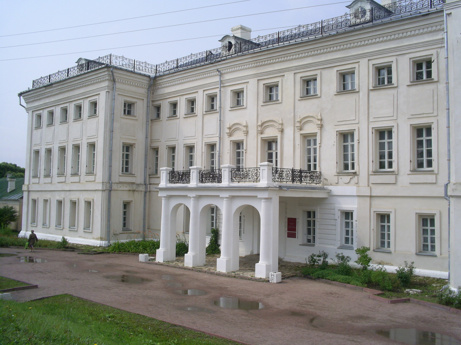 Барский дом усадьбы Гончаровых в посёлке Полотняный завод Калужской области.